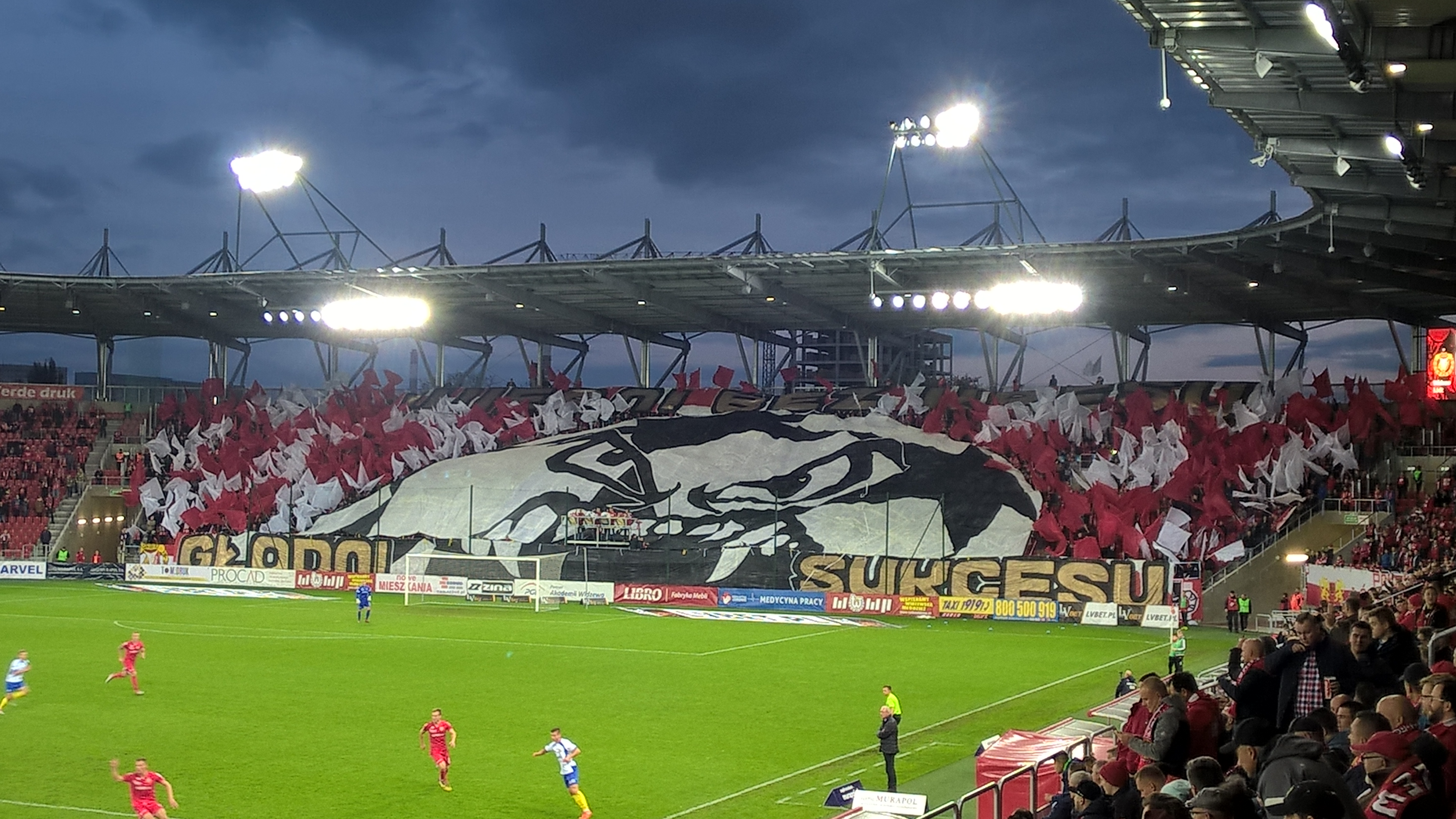 Mecz piłkarski na stadionie w Łodzi: Widzew Łódź – Tur Bielsk Podlaski (2017.10.07). Widok na trybunę D.